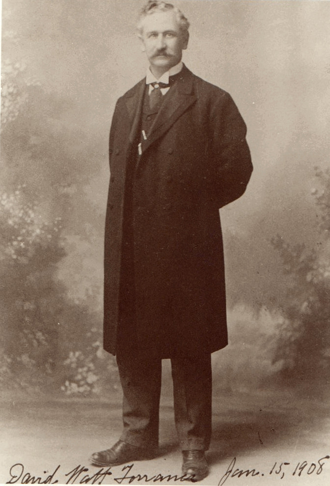 דייוויד ואט טוראנס, 1908. David Watt Torrance